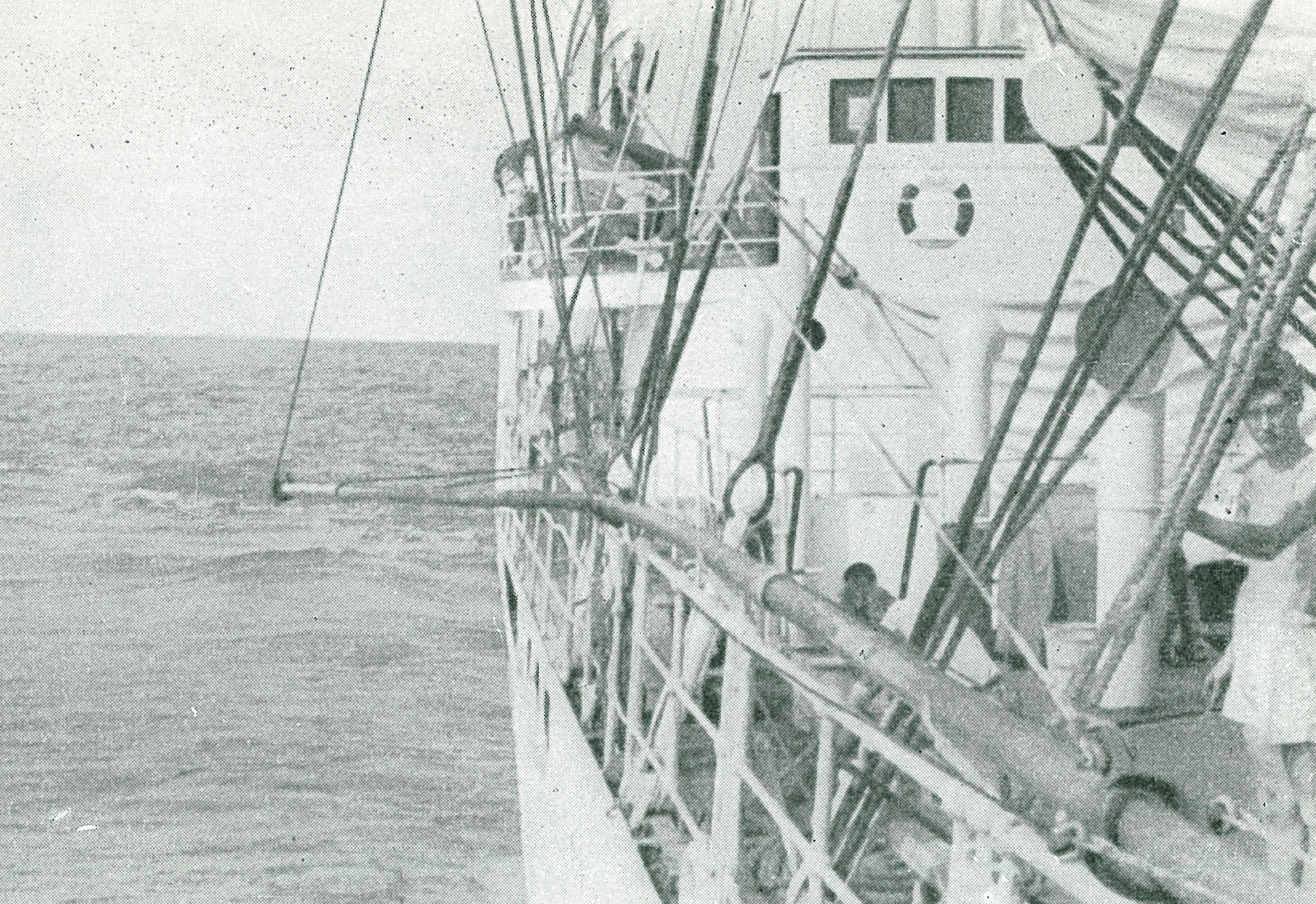 Fartyget Albatross. Ett kolvlod har precis bärgats efter det krökts av en hård lavabädd